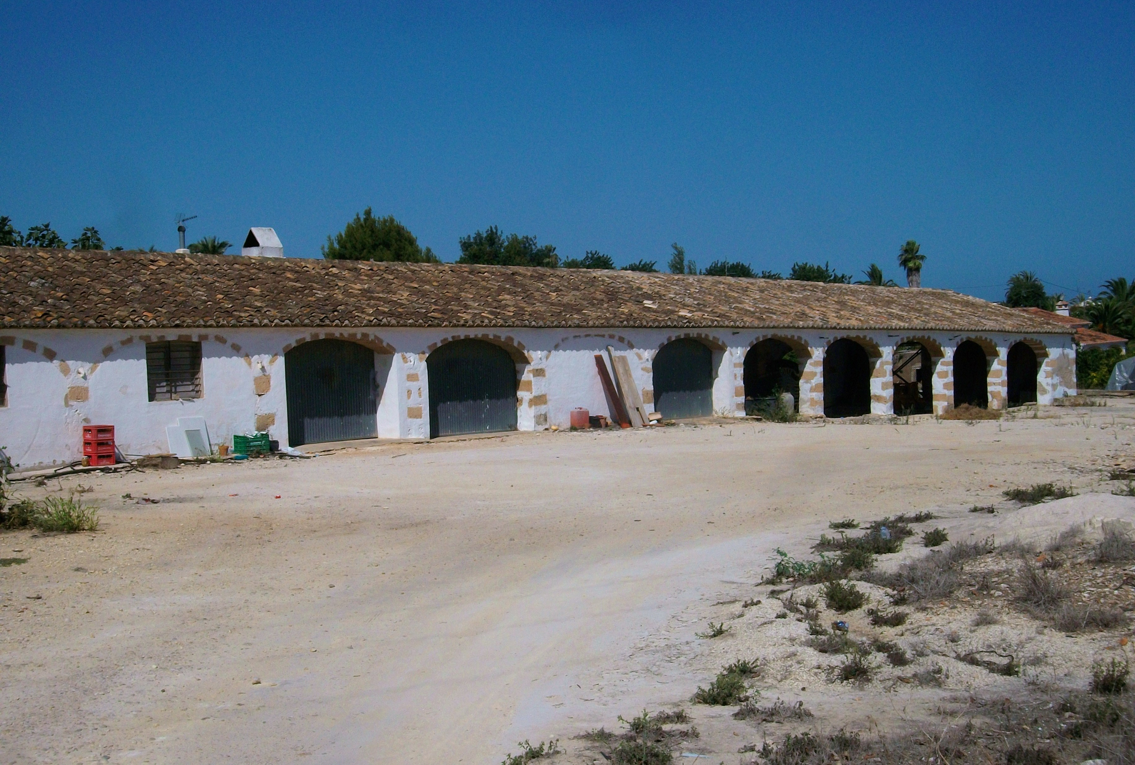 Riurau dels Cabrera de Xàbia, Marina Alta, País Valencià.